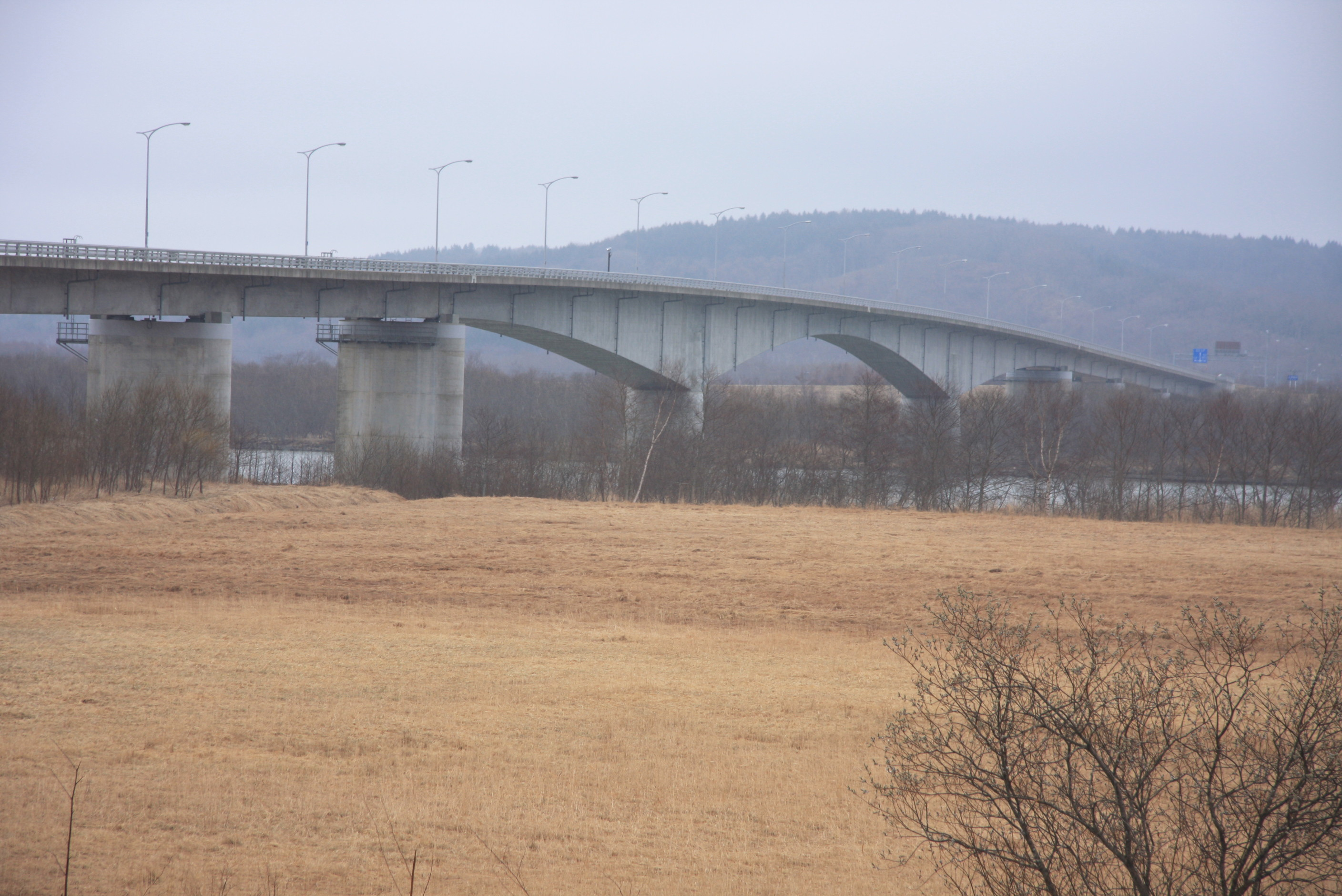 十勝河口橋 国道336号